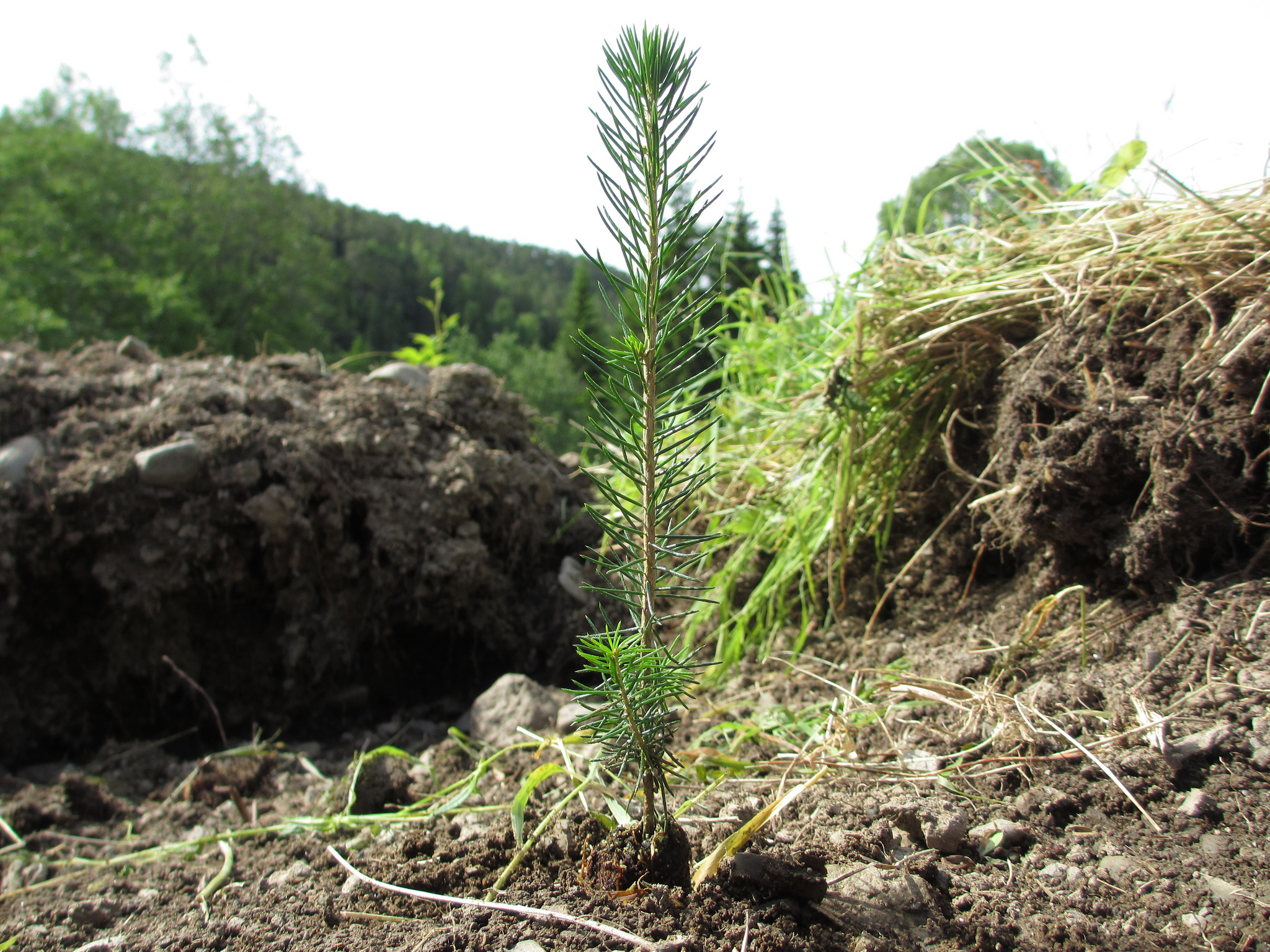 Foto: Landbruks- og matdepartementet